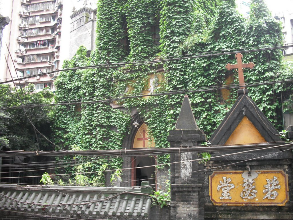 中文（中国大陆）: 重庆渝中区圣若瑟堂。